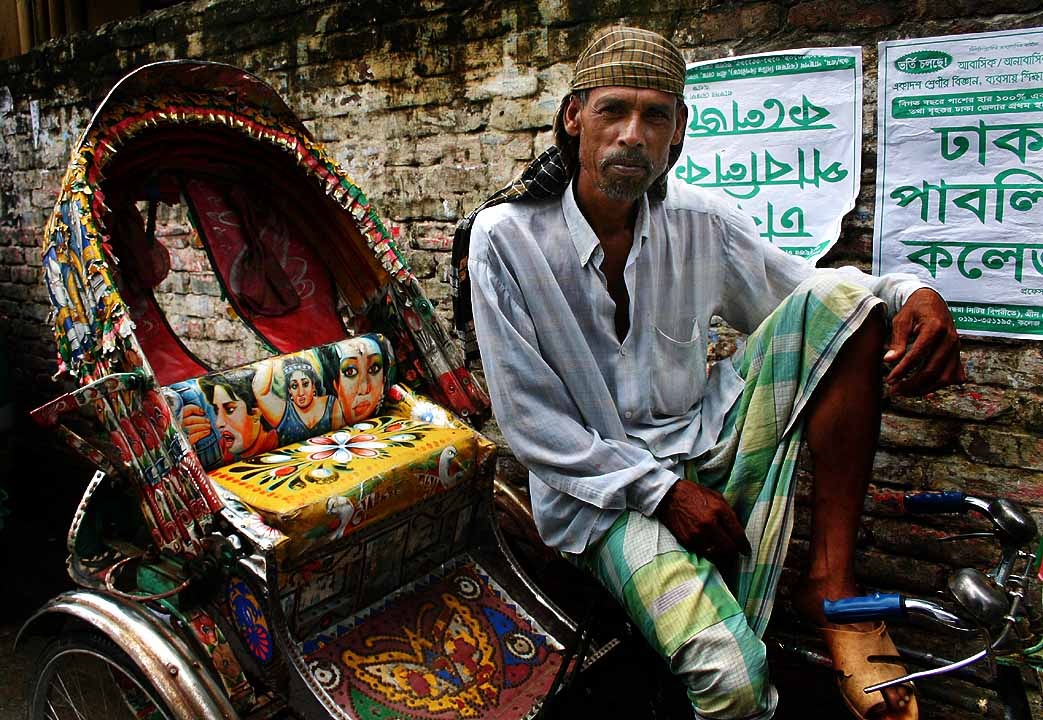 Cycle rickshaw wallah in Dhaka.